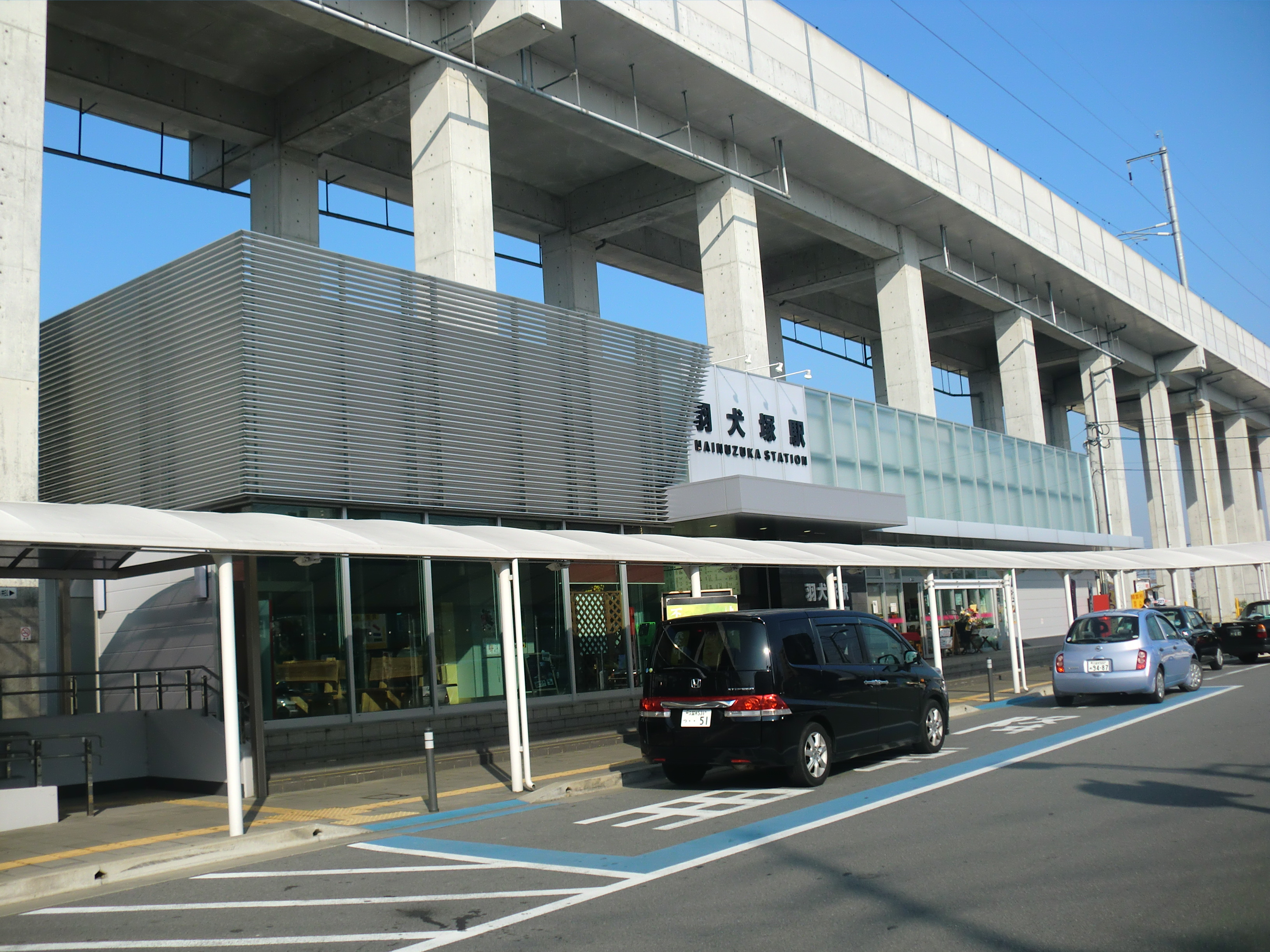 福岡県筑後市にある羽犬塚（はいぬづか）駅